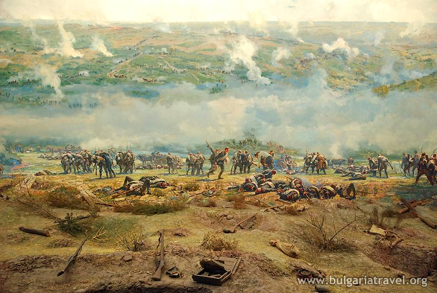 Плевен